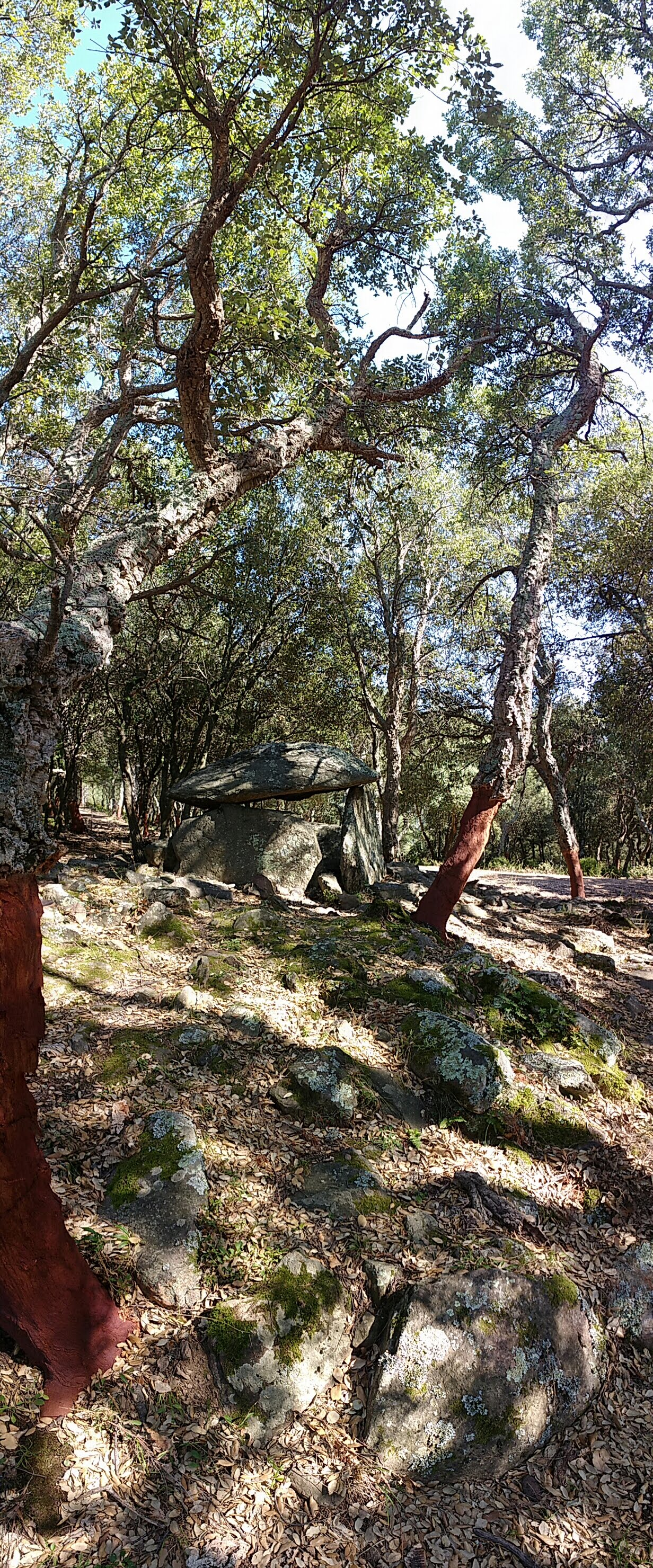 Dolmen de la Siureda dans son environnement